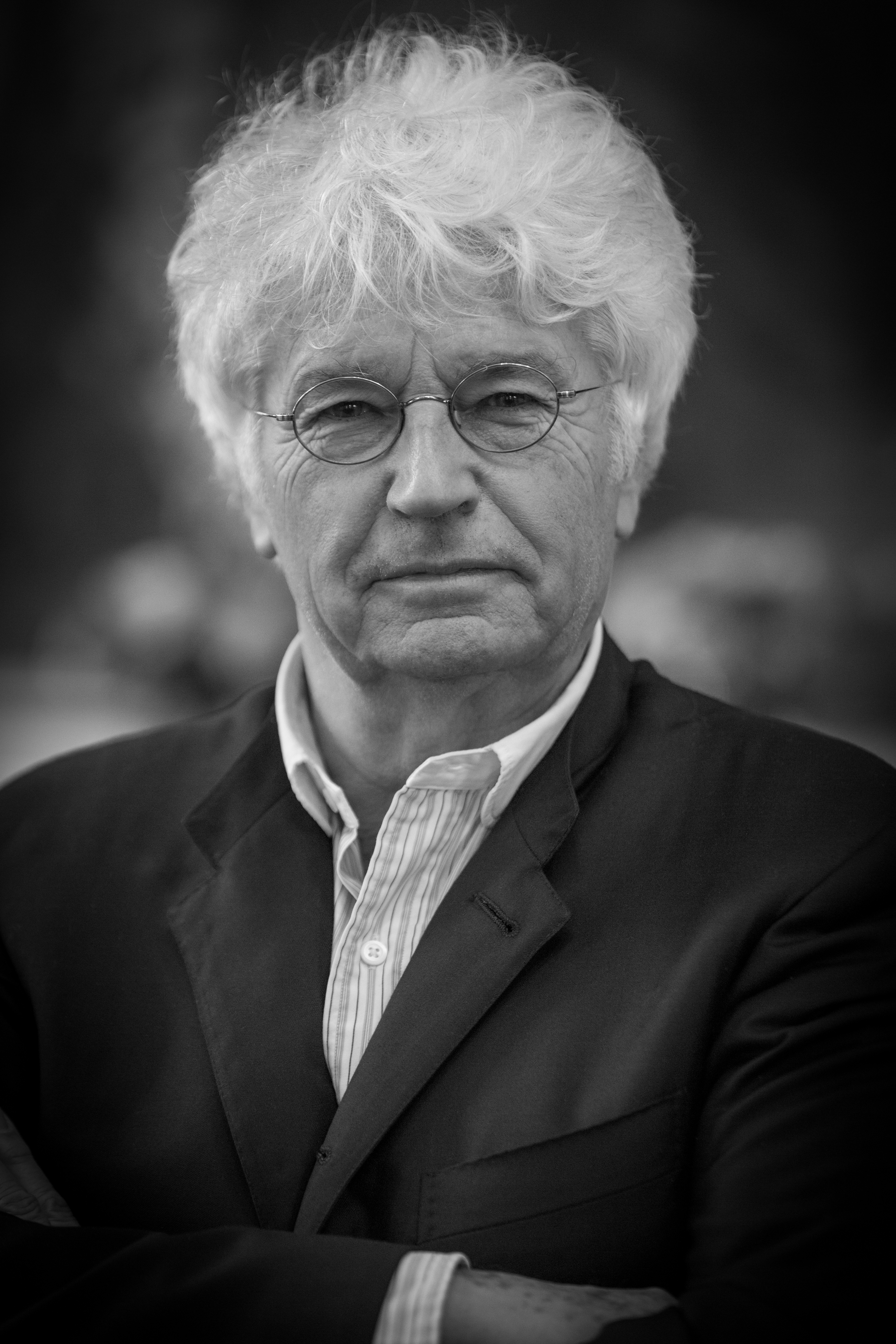 Jean-Jacques Annaud, né le 1er octobre 1943 à Juvisy-sur-Orge (Essonne), est un réalisateur et scénariste français.